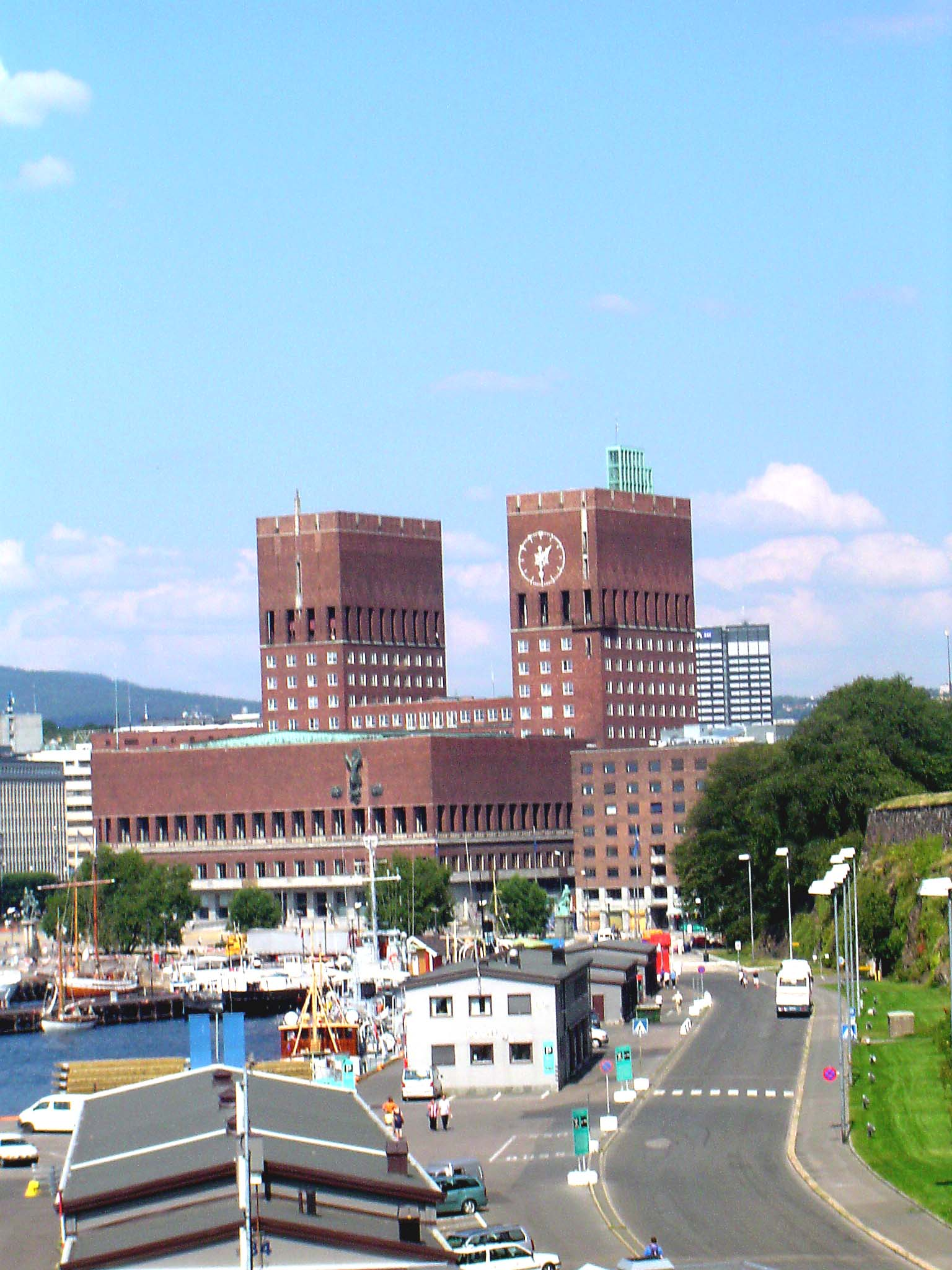 D'Haaptstad Oslo (2004).